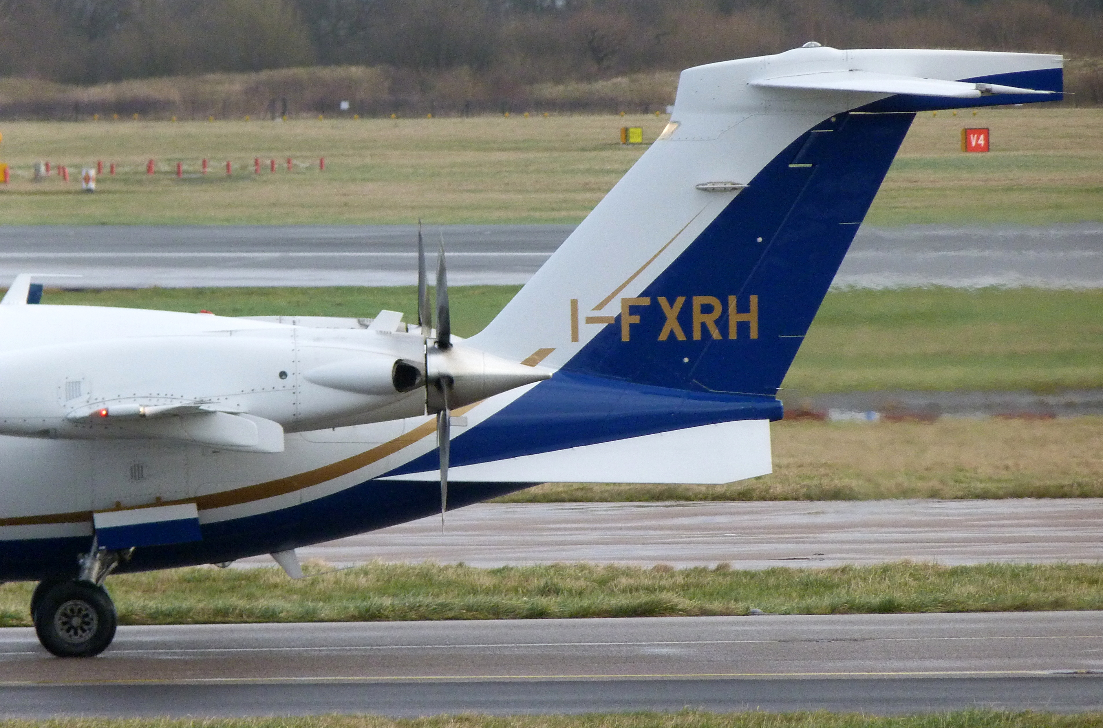 I-FXRH Piaggio P-180 Avanti II